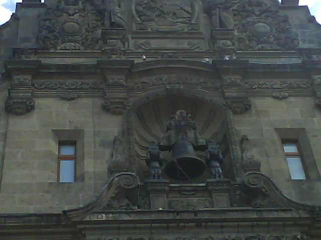 Original campana de la Parroquia de Dolores Guanajuato trasladada al DF, por Porfirio Díaz y situada en un altar especial.